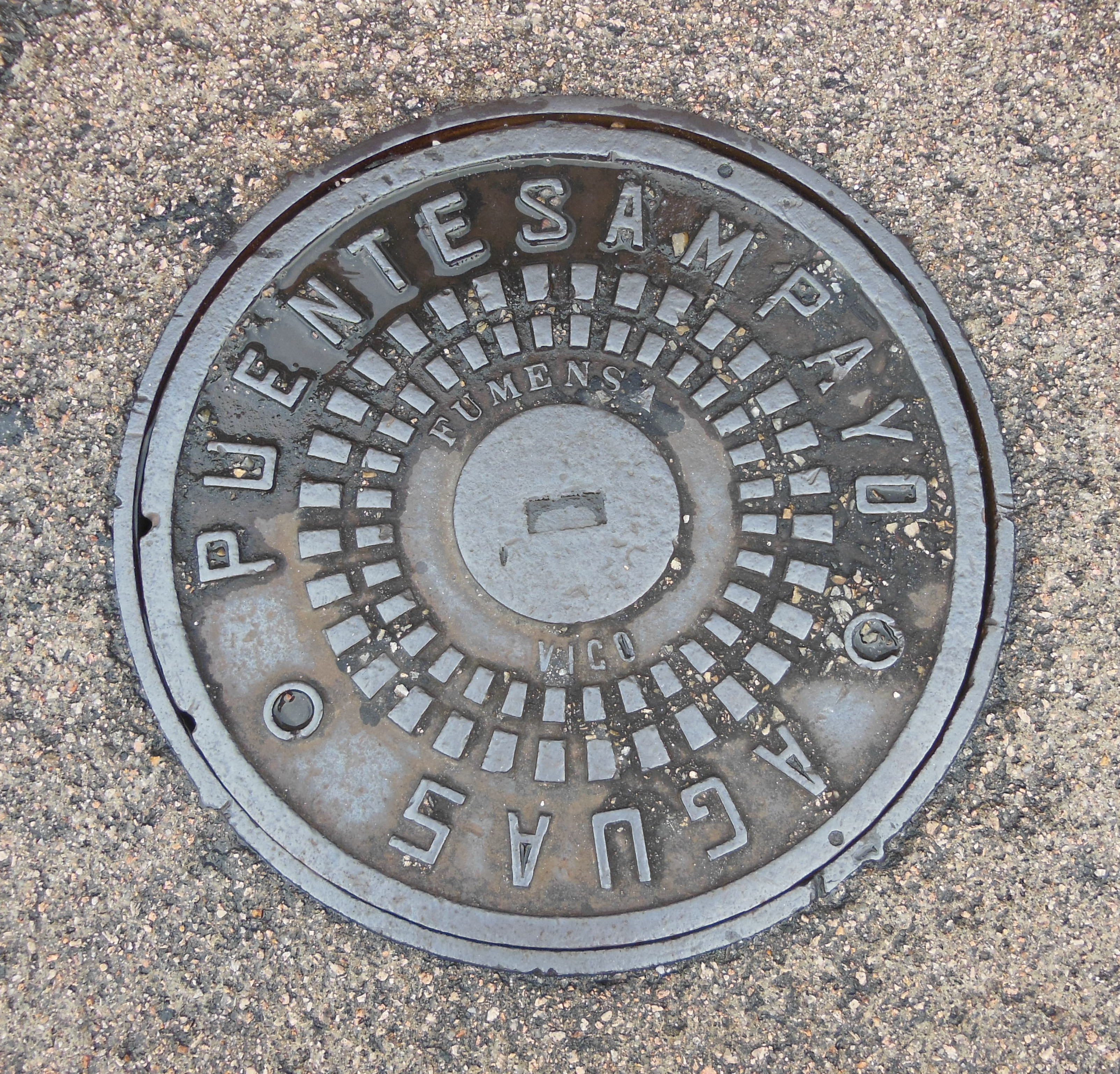 Tapa de rexistro de Ponte Sampaio